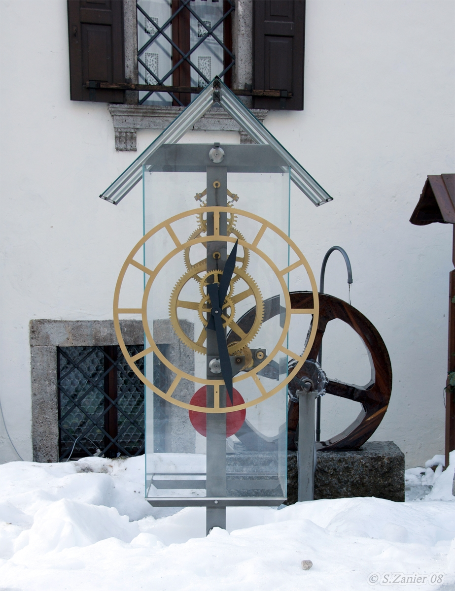 Furlan: Un atri orloi a aghe